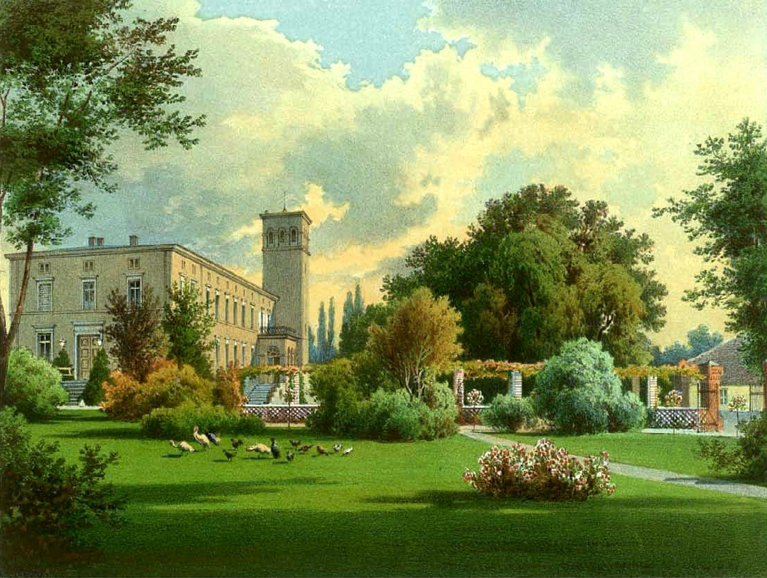 Schloss Felchow, Kreis Angermünde